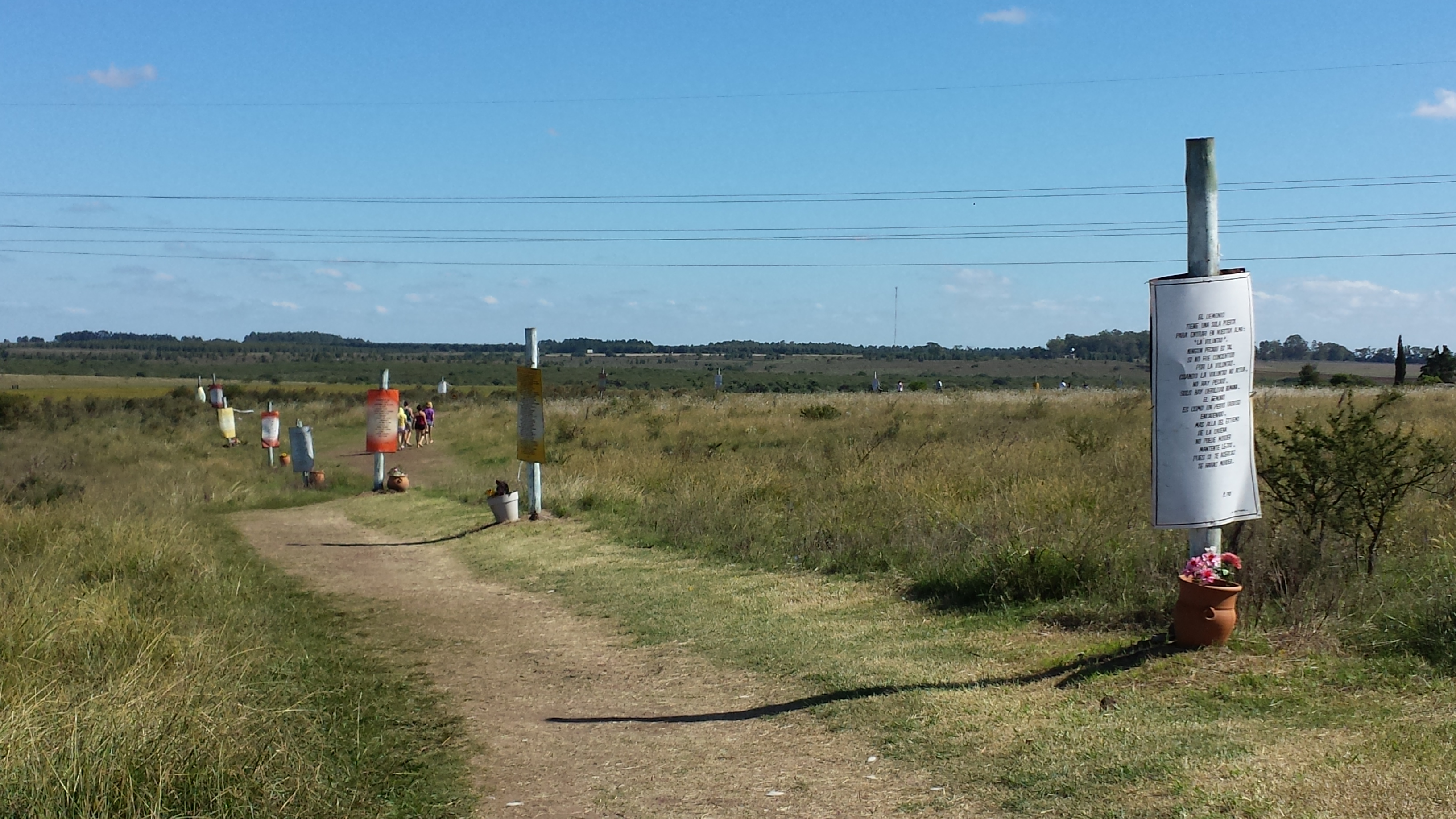 Sendero que conduce a la gruta del Padre Pío en Uruguay